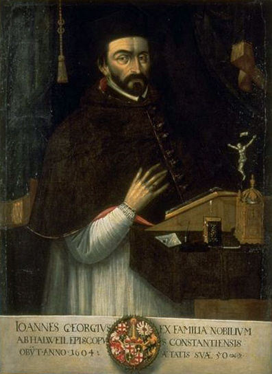 Johann Georg von Hallwil, Bischof von Konstanz. Öl auf Leinwand; Nach 1604. 109 cm x 80 cm